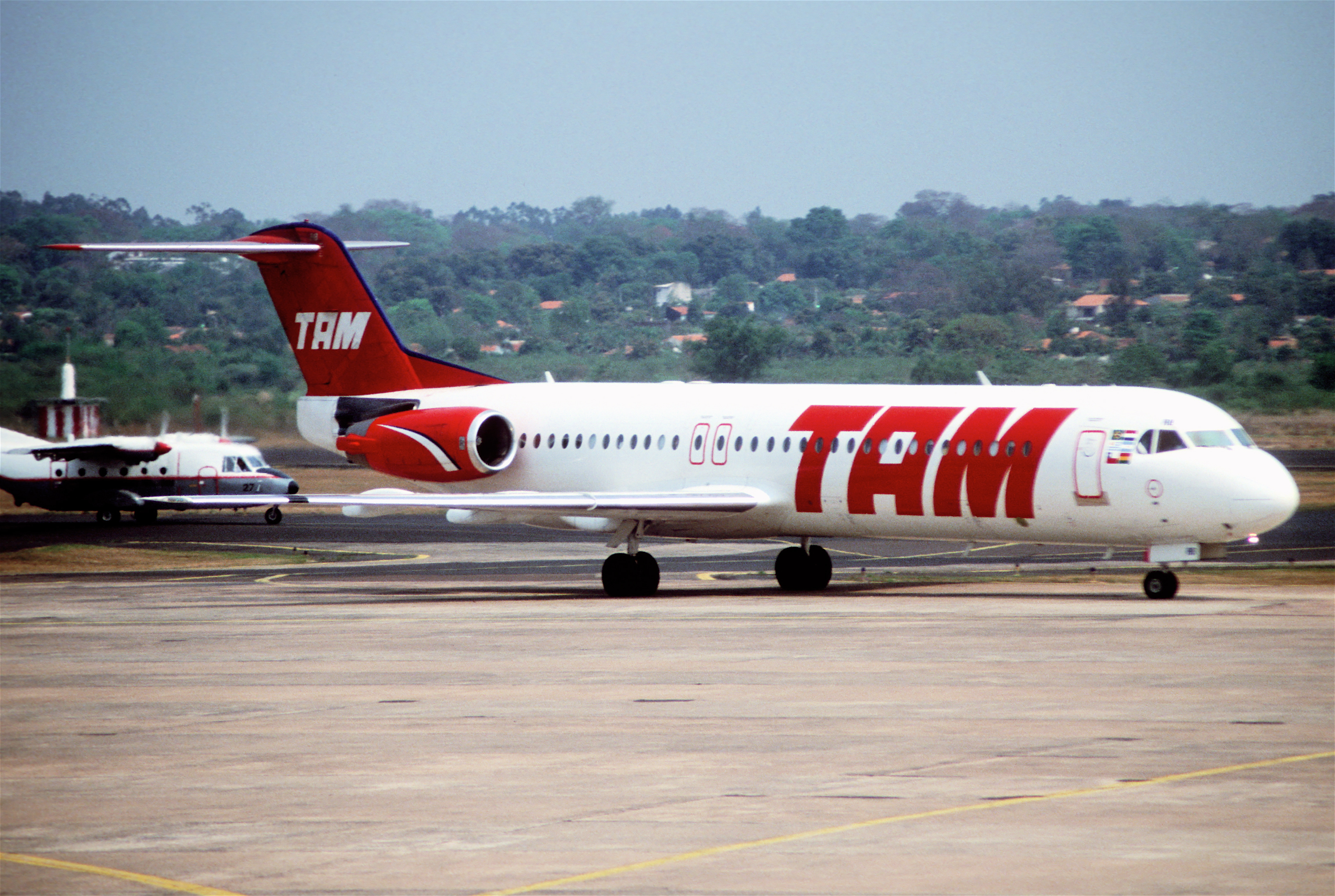 321ao - TAM Fokker 100; PT-MRT@ASU;24.9.2004